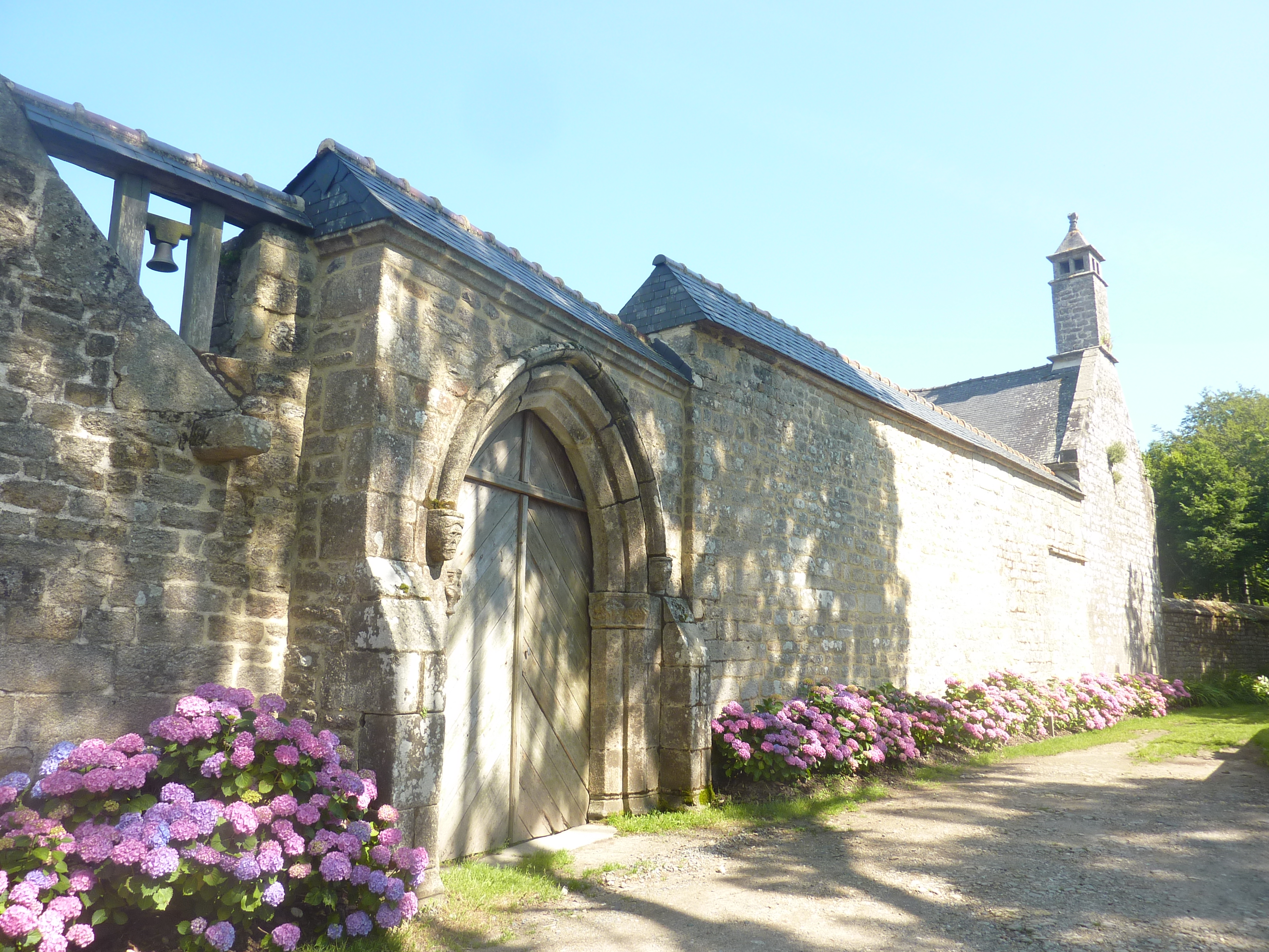 Pont-l'Abbé : le manoir de Trévannec, portail d'entrée et campanile. Le portail d'entrée est orné d'une arcade ogivale à deux têtes. Le campanile existait déjà en 1427.